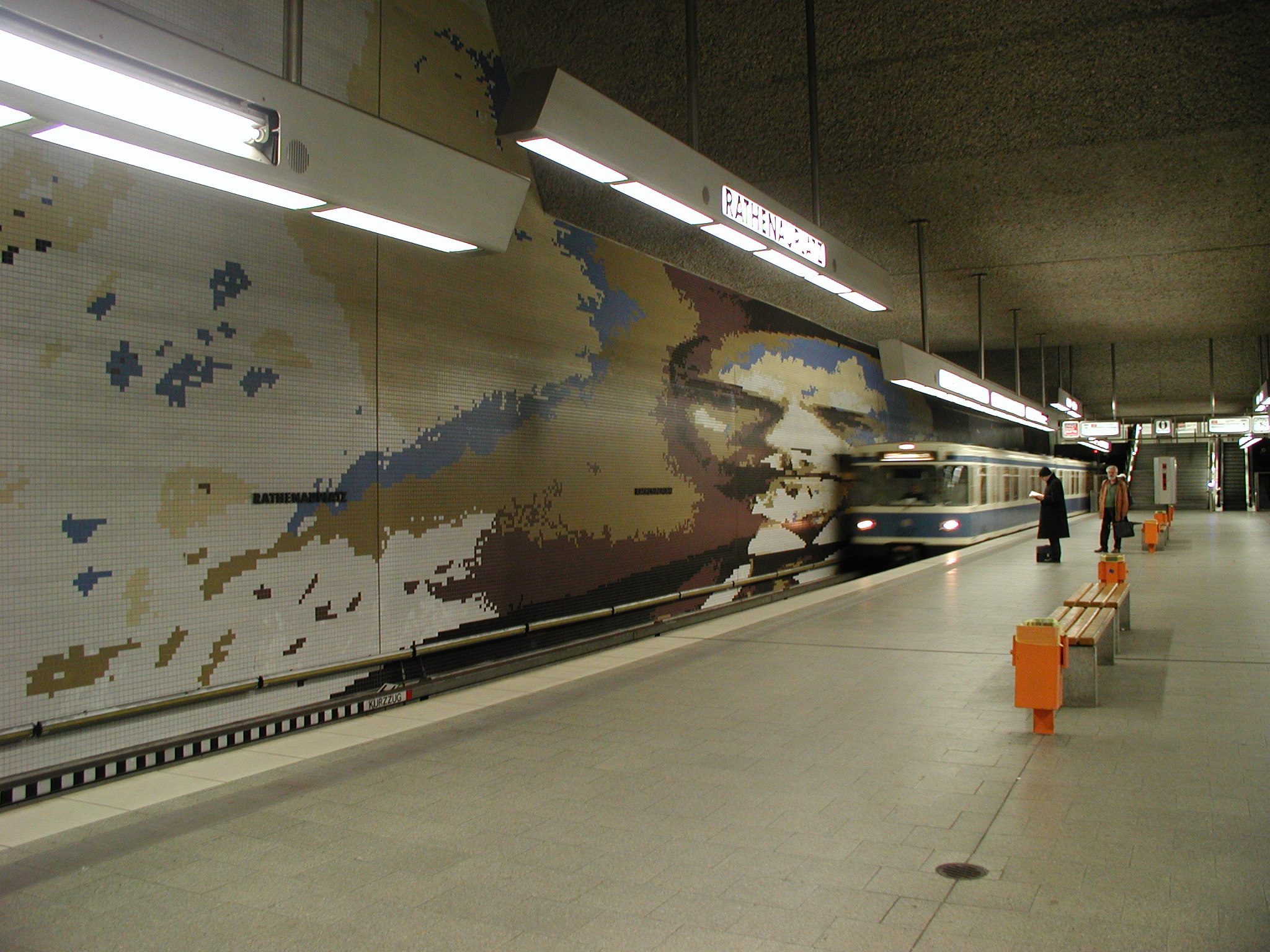 U-Bahnhof Nürnberg Rathenauplatz Künstlerische Gestaltung des Großmosaiks 1990 von Gregor Hiltner (zeigt Walther Rathenau)